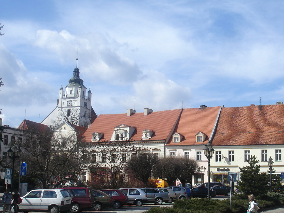 Kluczbork, Rynek